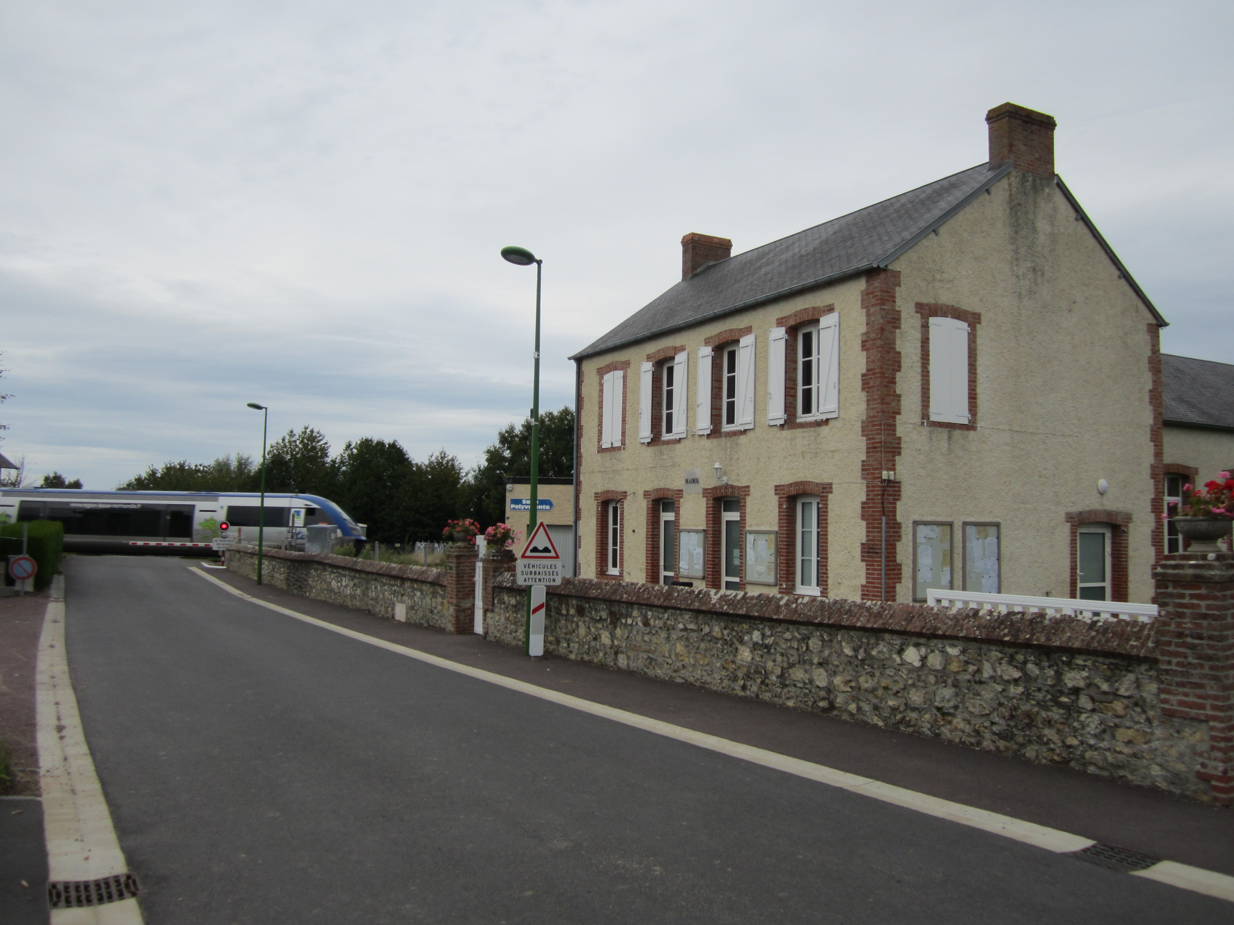 Anctoville-sur-Boscq, Manche